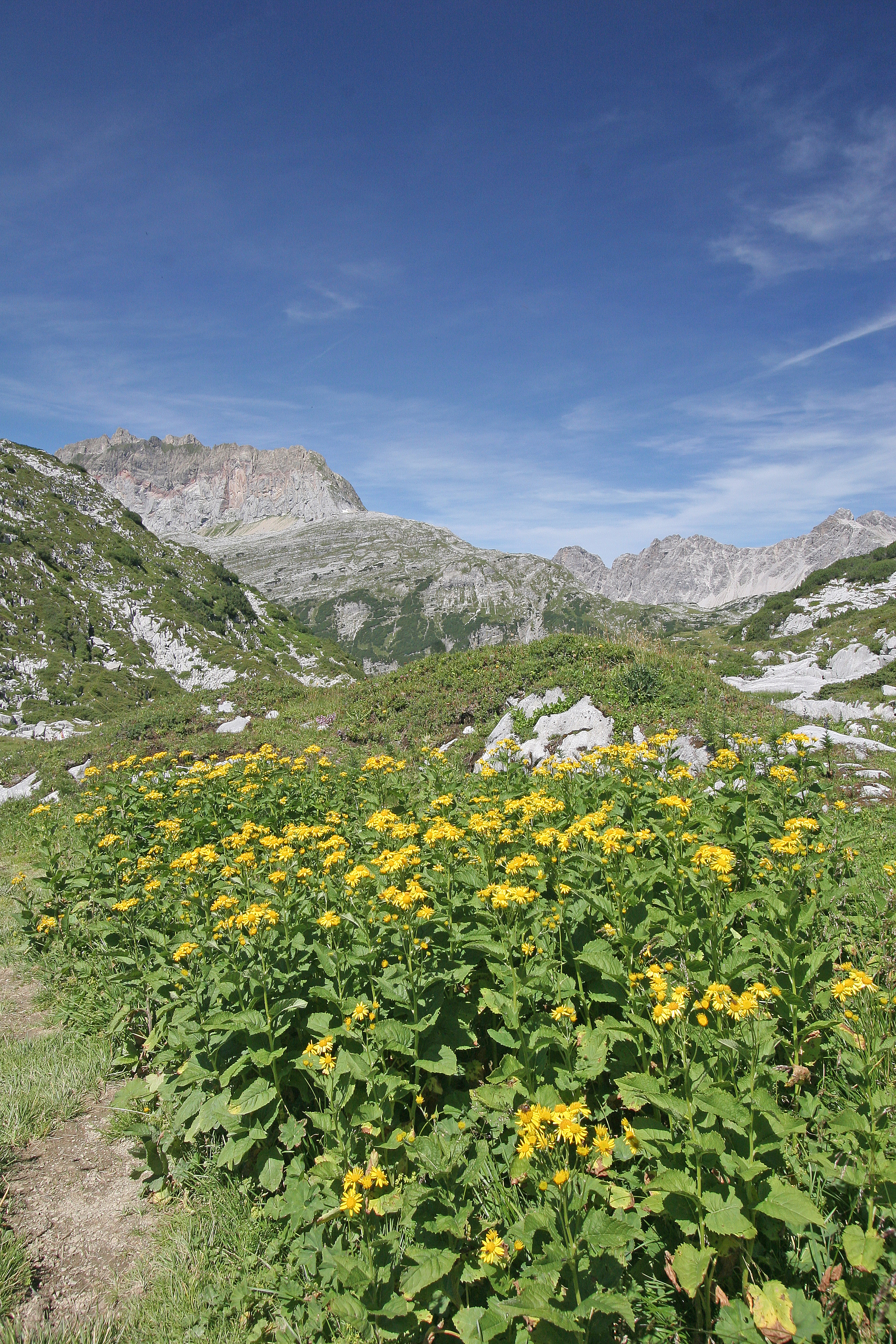 Plants am Formarinsee - Jacobaea alpina